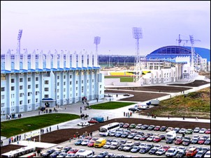 Estadio de fútbol "Sheriff FC" en Transnistria